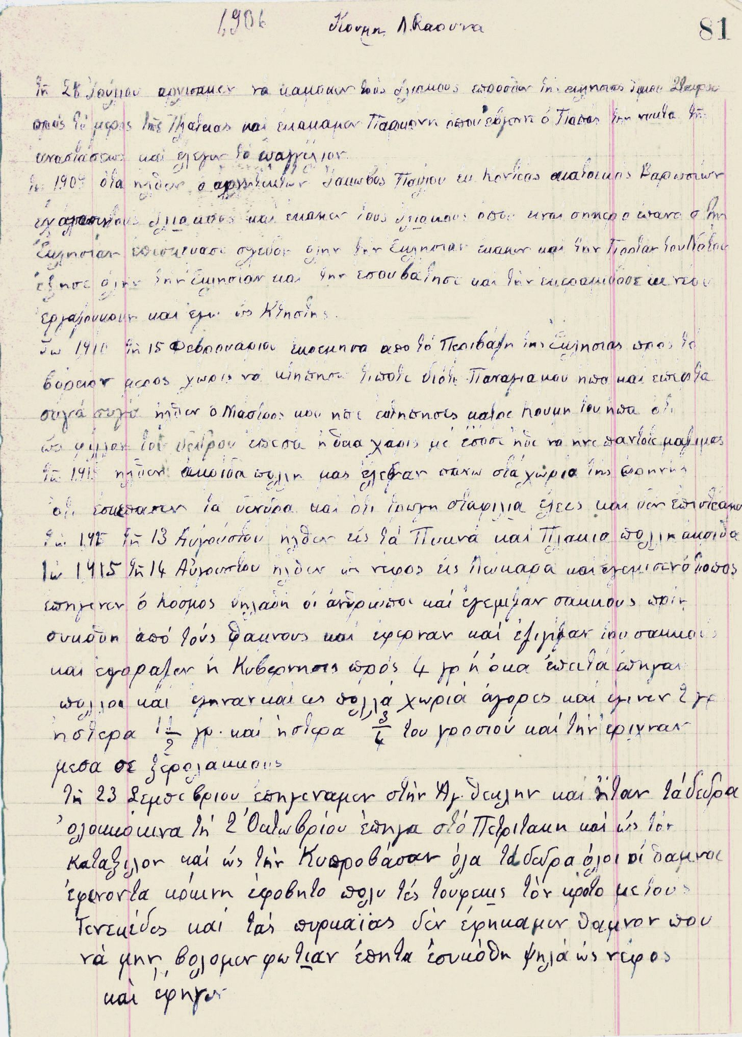 Imerologio yiakoumi